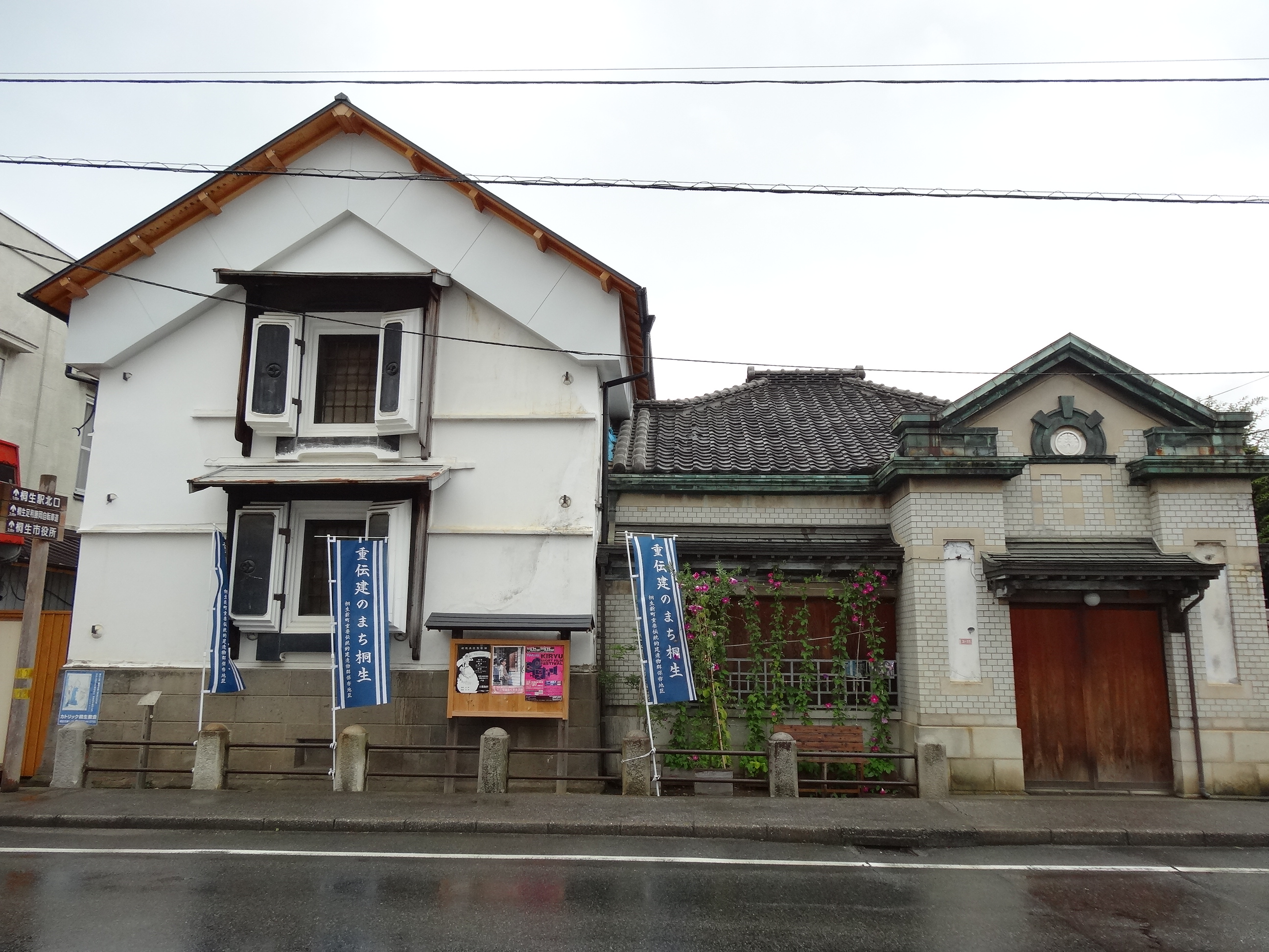 森合資会社事務所（右）、森合資会社店蔵（左）、群馬県桐生市本町1丁目